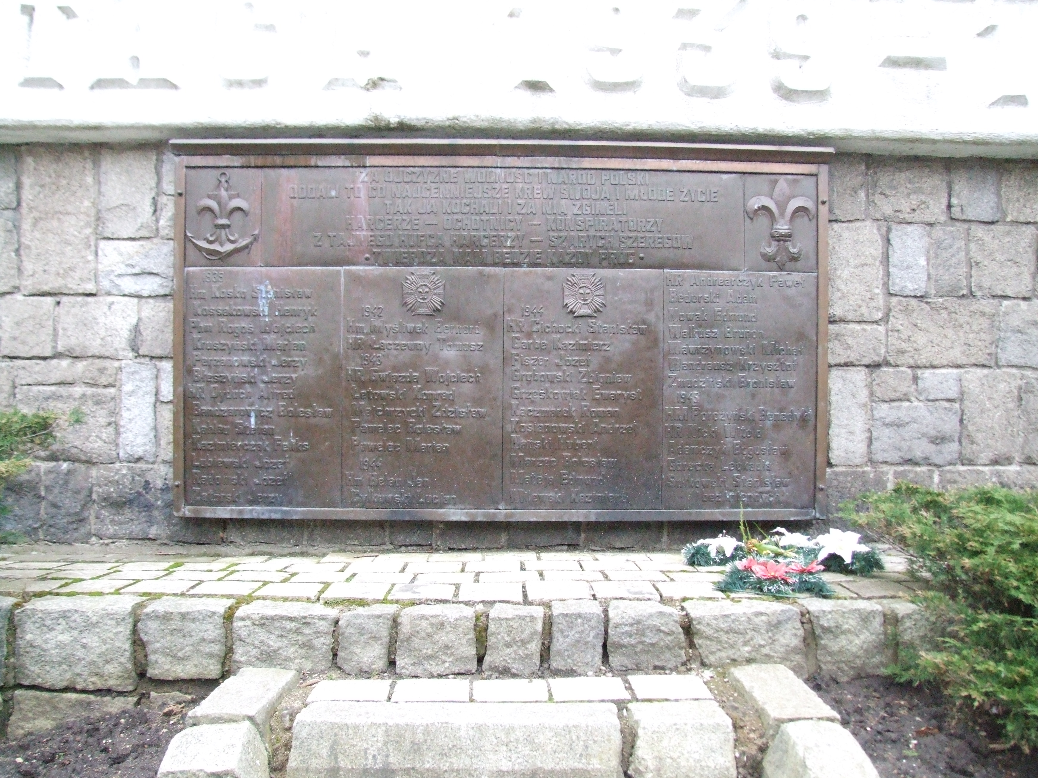 Pomnik Harcerzy Gdyńskich (Tajnego Hufca Harcerzy), Gdynia